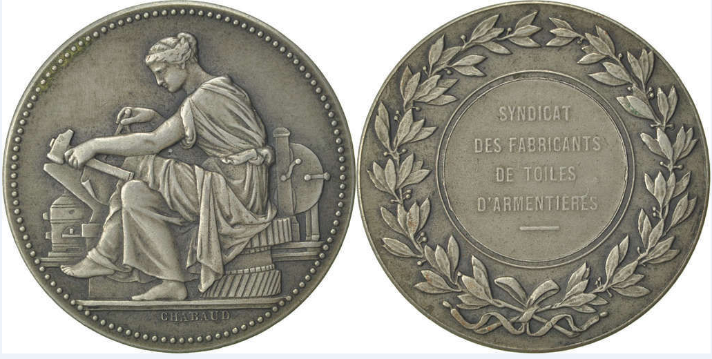 médaille du syndicat des fabricants de toiles d'Armentières